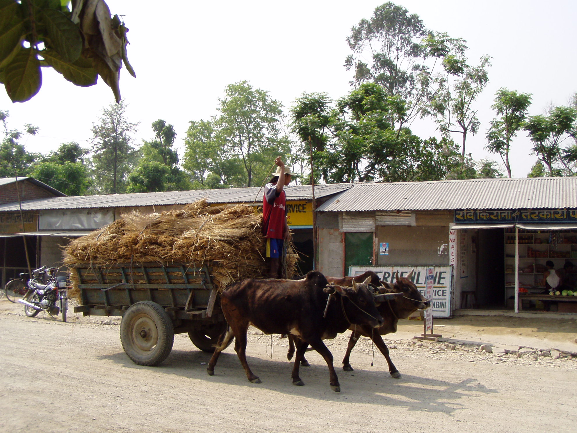 Ox car in Sauraha (Nepal)